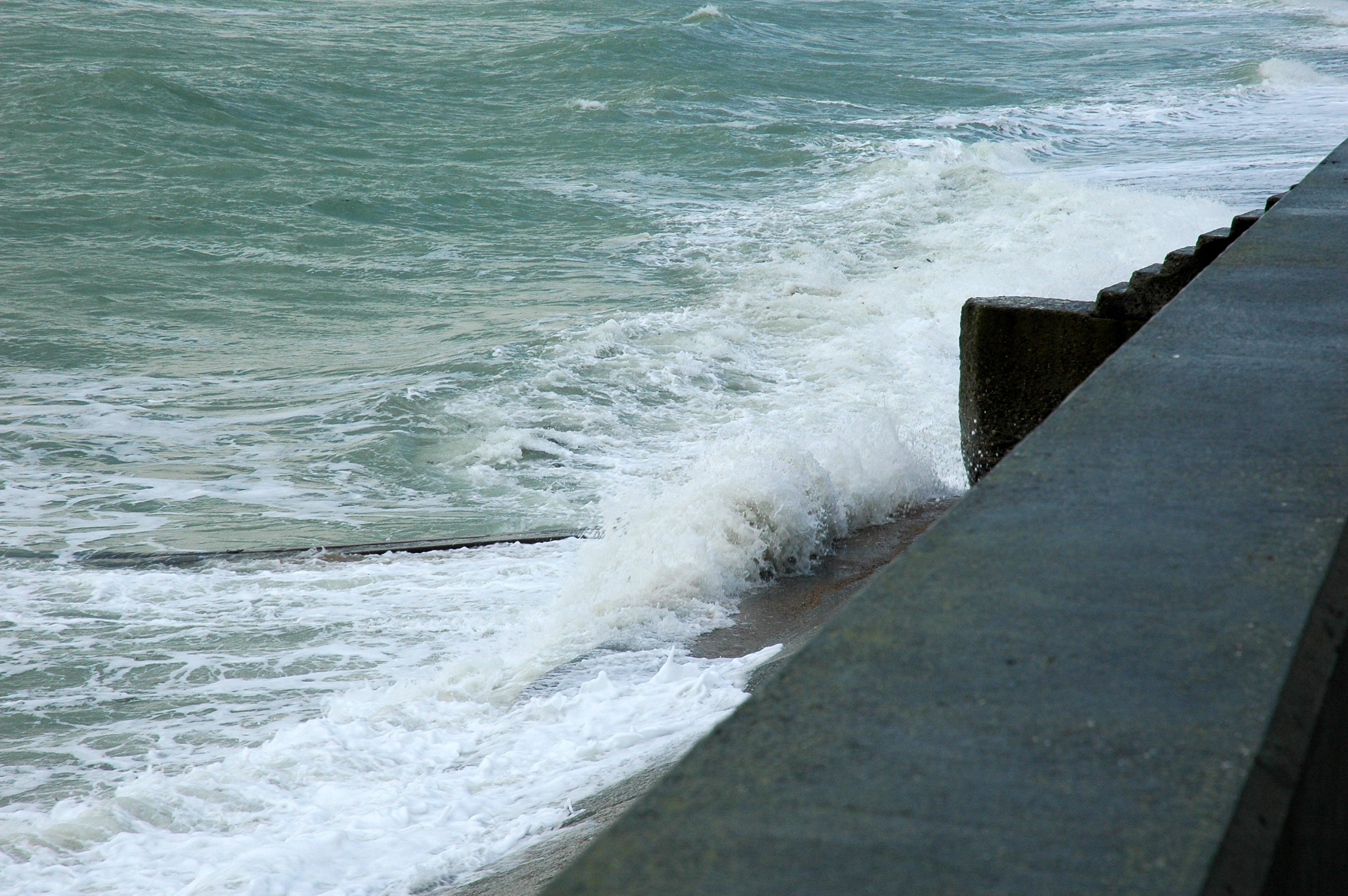 Veulettes-sur-Mer (Seine-Maritime, France). Vague frappant la digue.